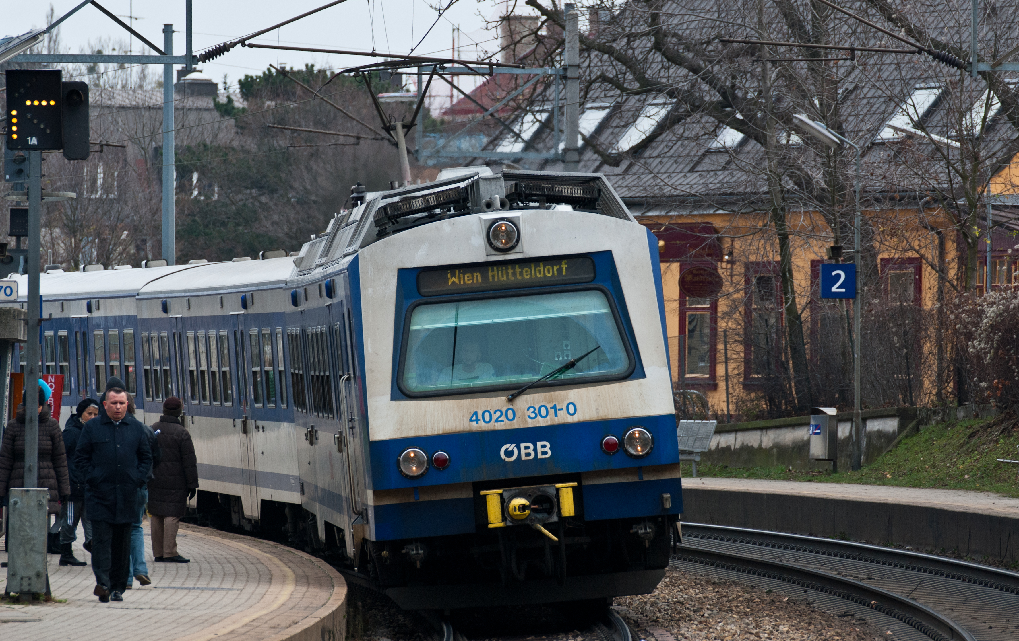 S-Bahn Zug ÖBB 4020-301 in Wien Speising